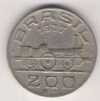 Uma moeda de 200 Réis cunhada em 1937. This graphic was created with GIMP.